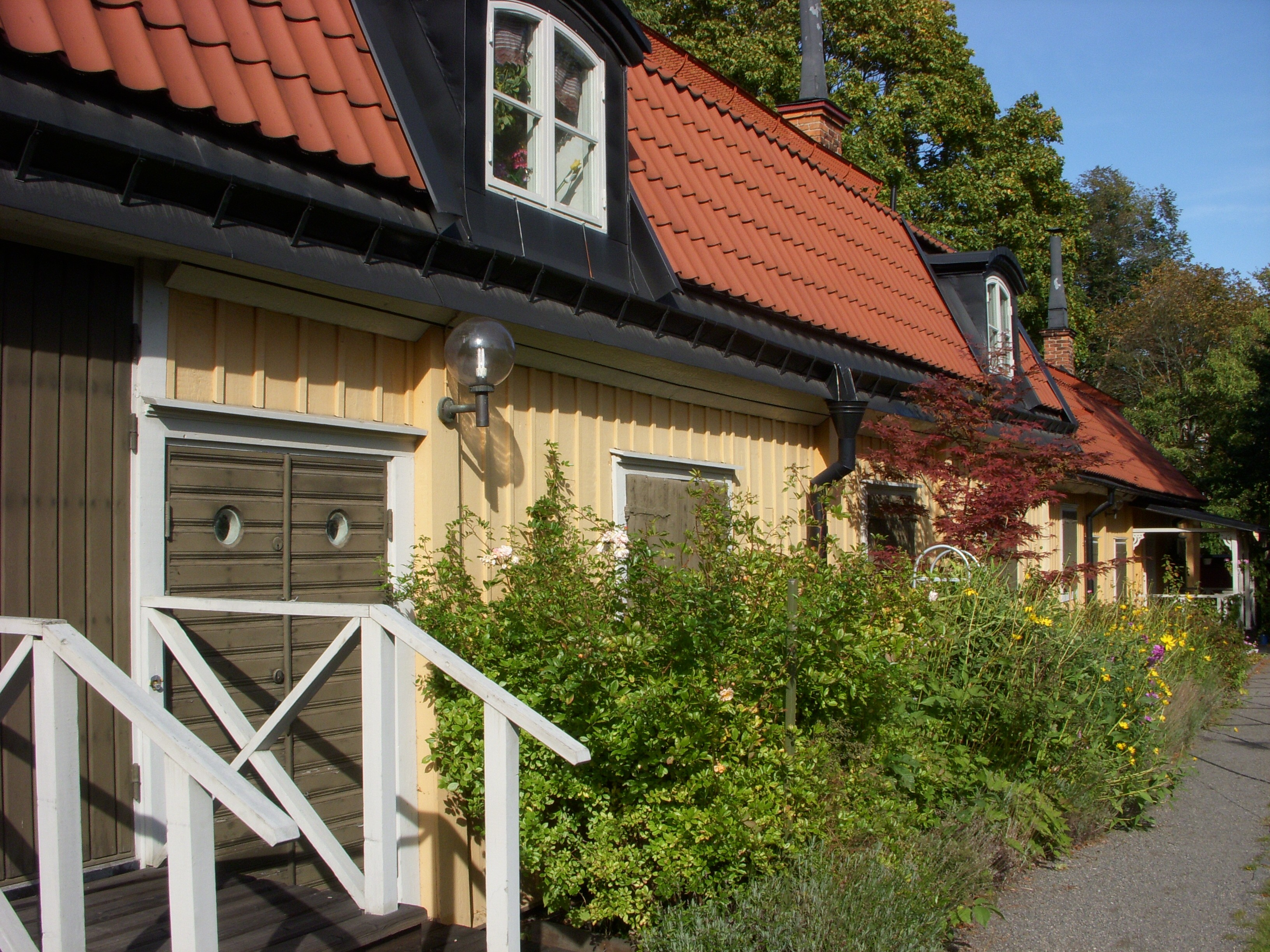 Ekermanska malmgården på Södermalm